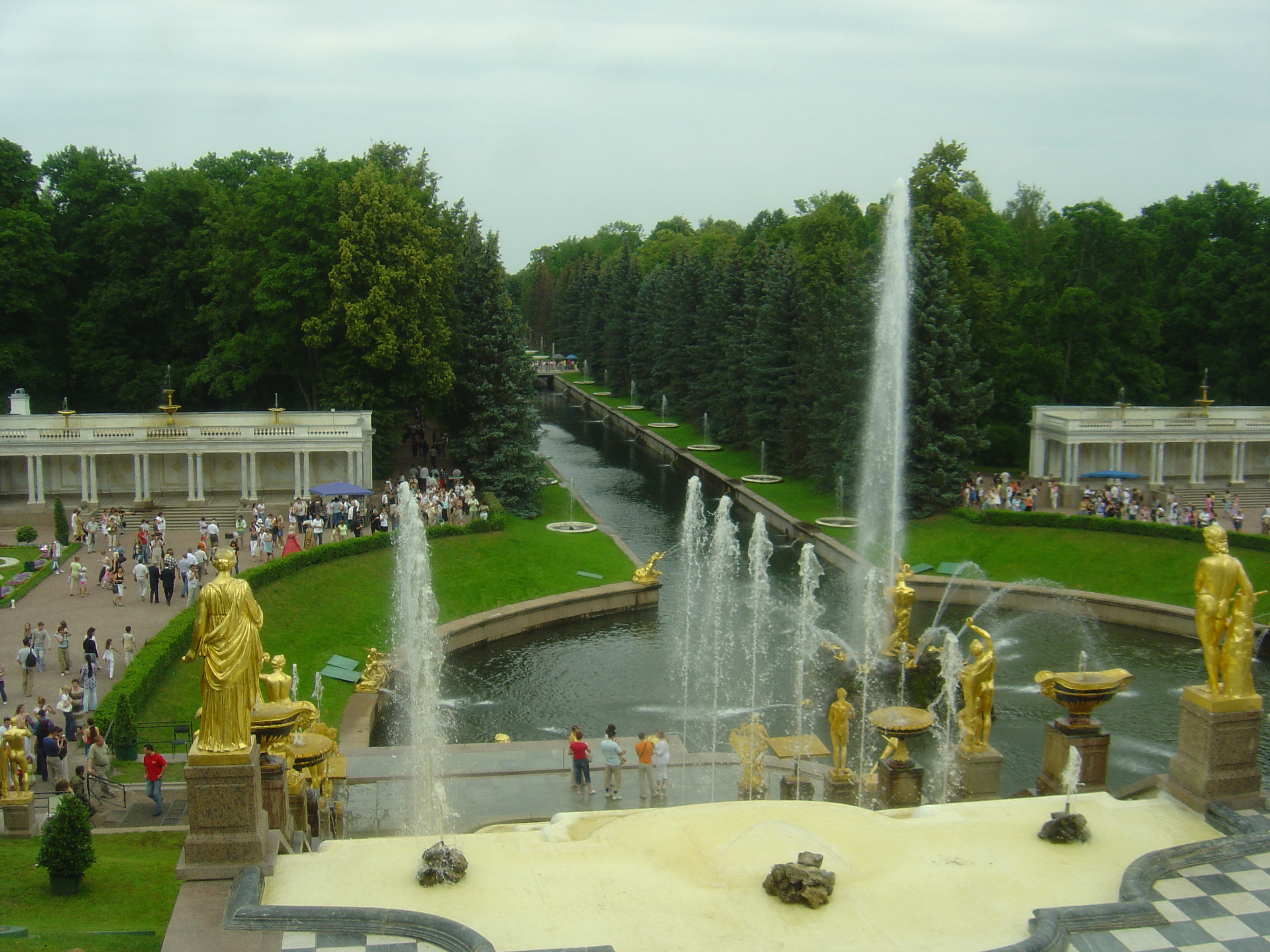 Ο Μεγάλος Καταρράκτης στο Πέτερχοφ με θέα προς το Ναυτικό Κανάλι